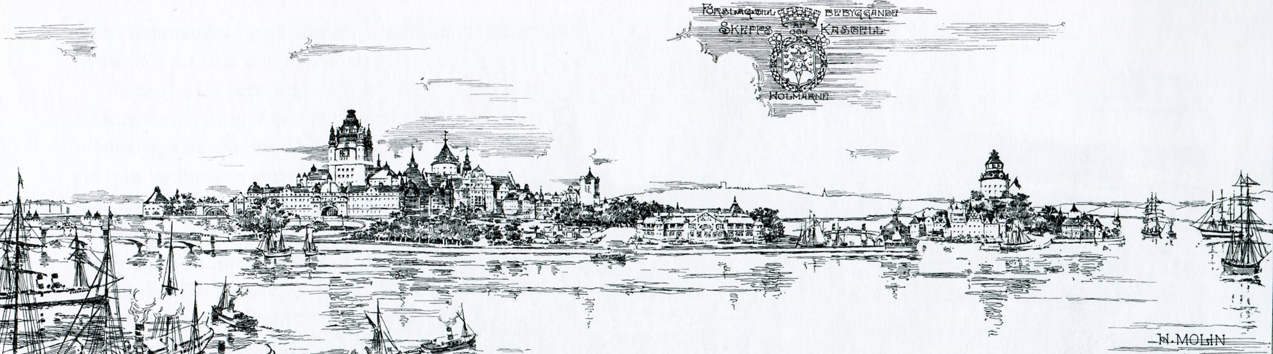 Förslag till bebyggelse på Skeppsholmen och Kastellholmen